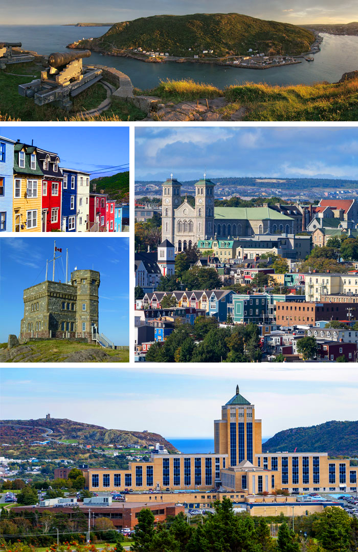 Saint-Jean de Terre-Neuve